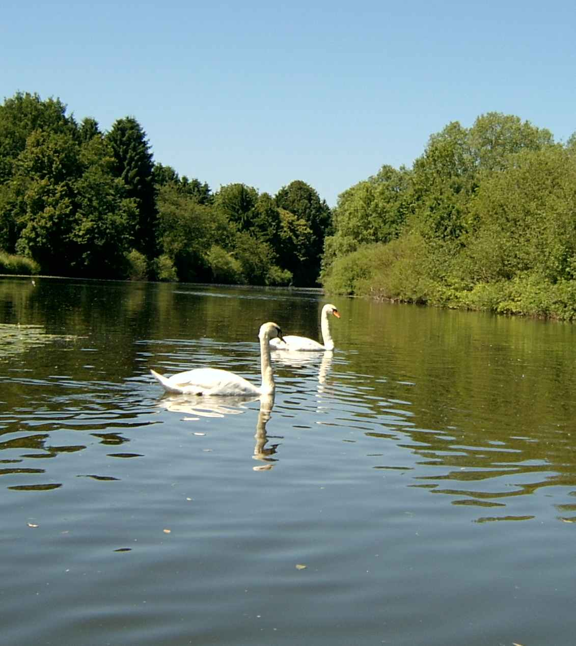 Die Lahn zwischen Gießen und Wetzlar.